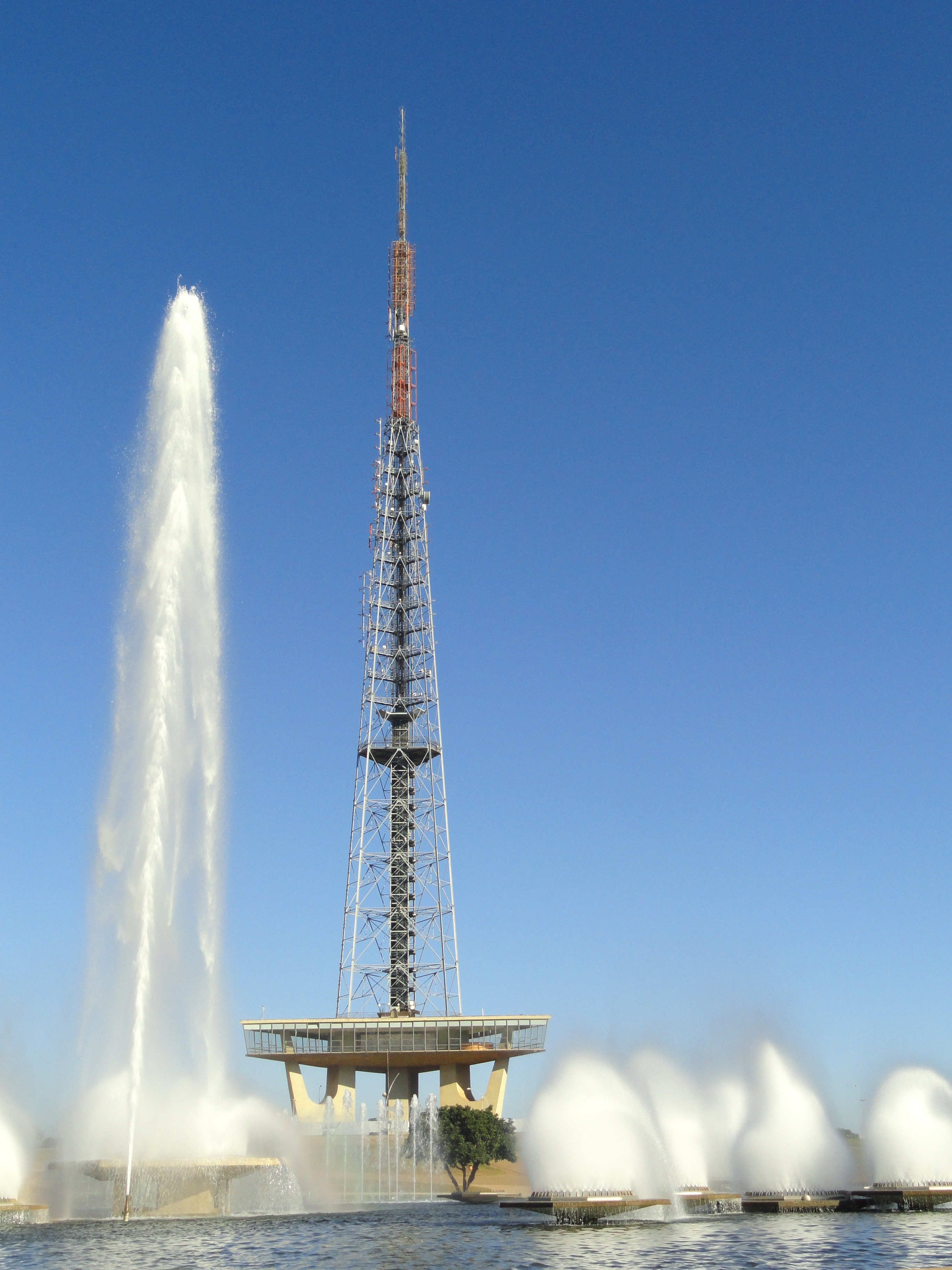 Torre de TV de Brasília, Brasília, Brazil.